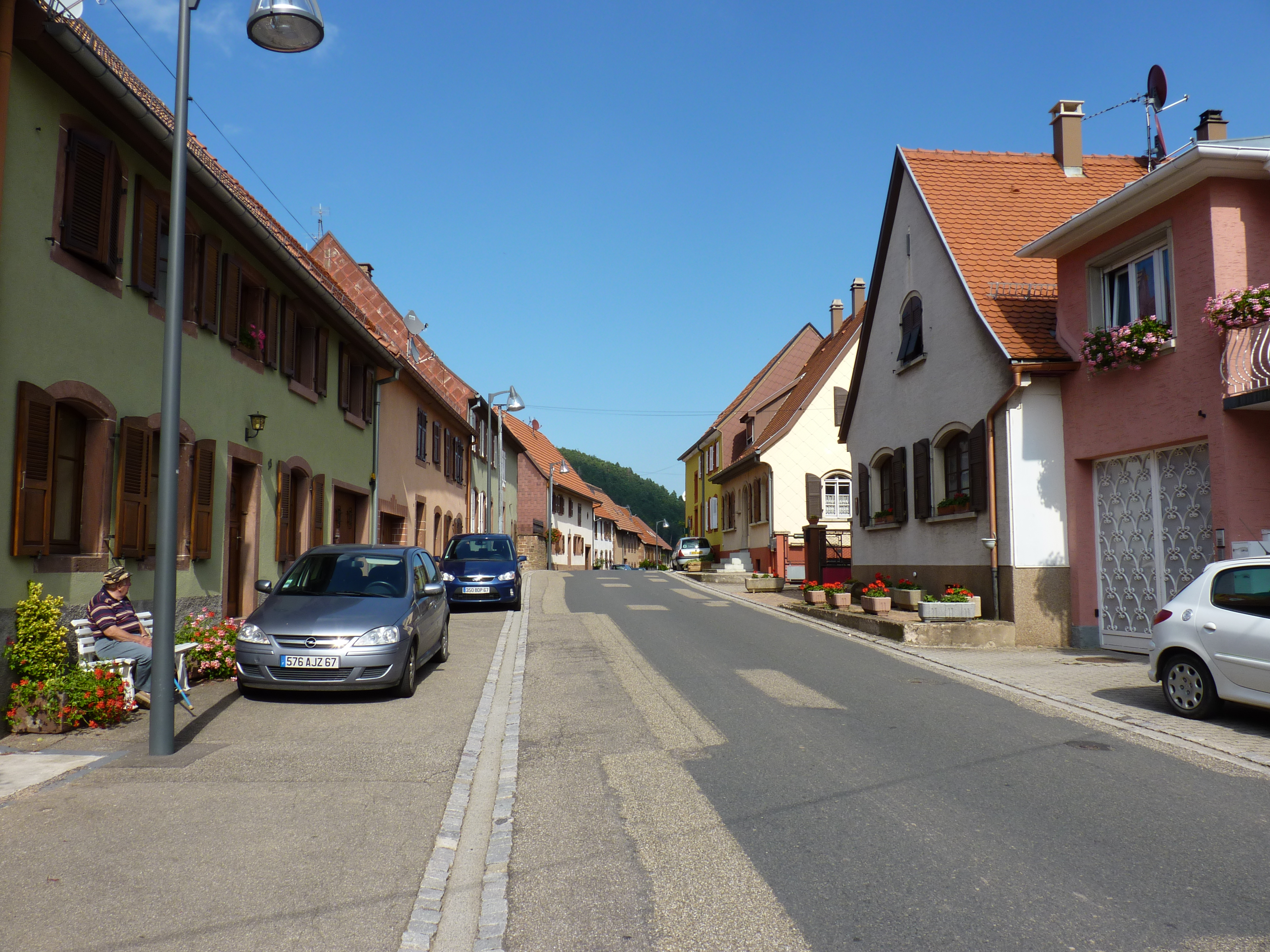 La rue principale du village